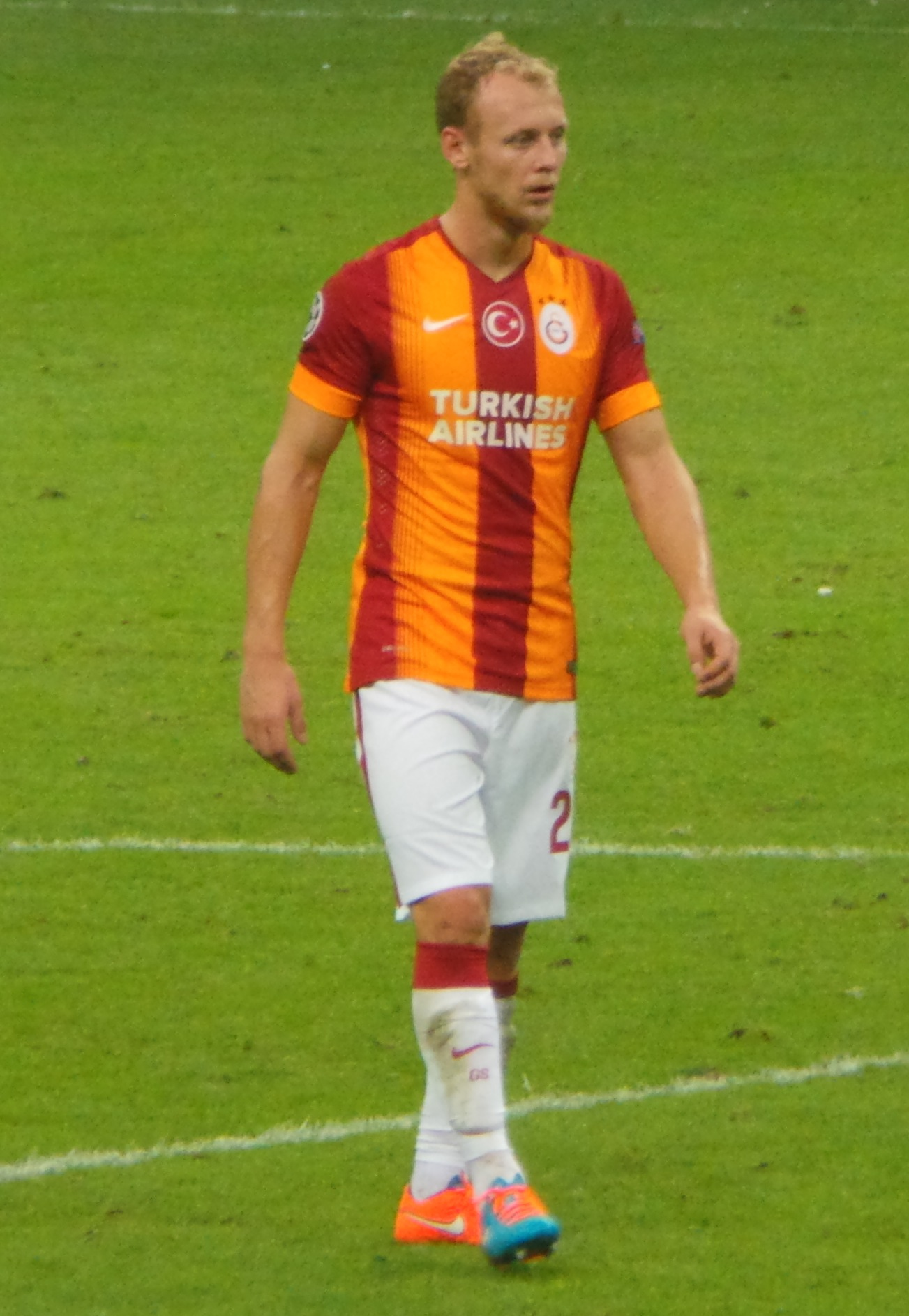 Semih Kaya